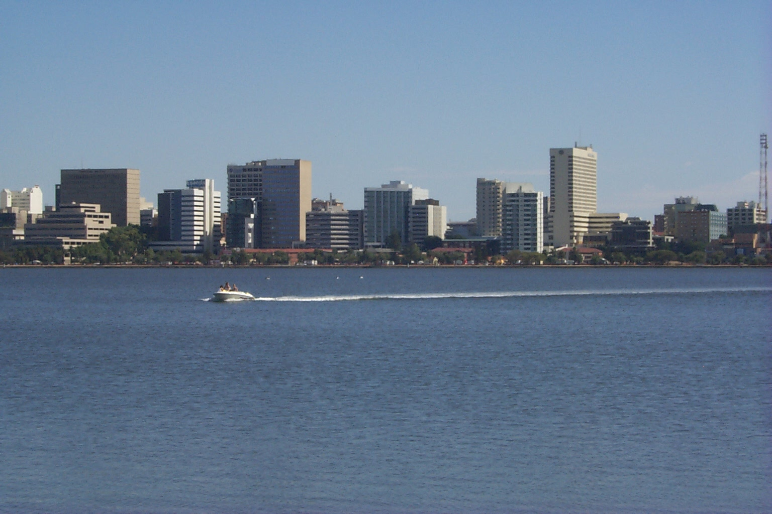 Perth Waterfront.